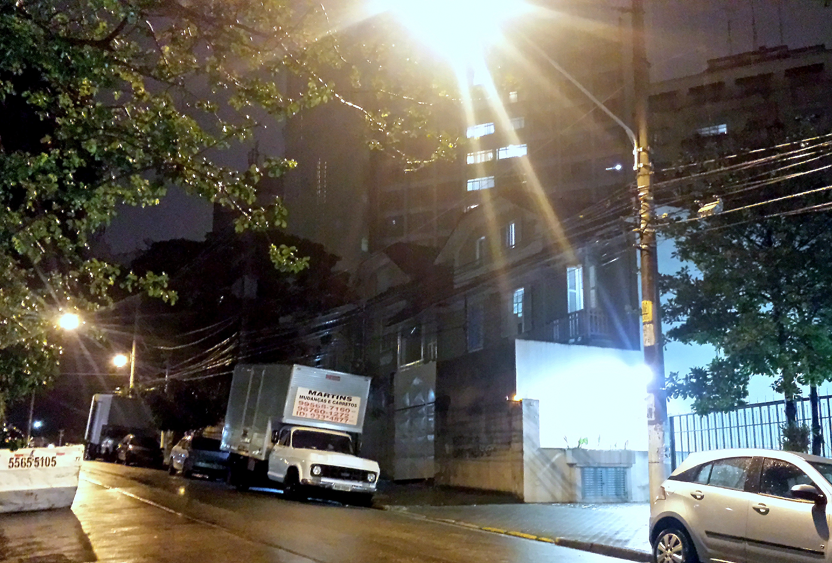 Ao fundo na foto vemos um casarão antigo do bairro Bela Vista que há anos é usado como cortiço para as famílias de menores condições da região. Durante a expansão vertical do bairro, construtoras se uniram para reformar a fachada do local em busca de não afastar futuros compradores de imoveis.